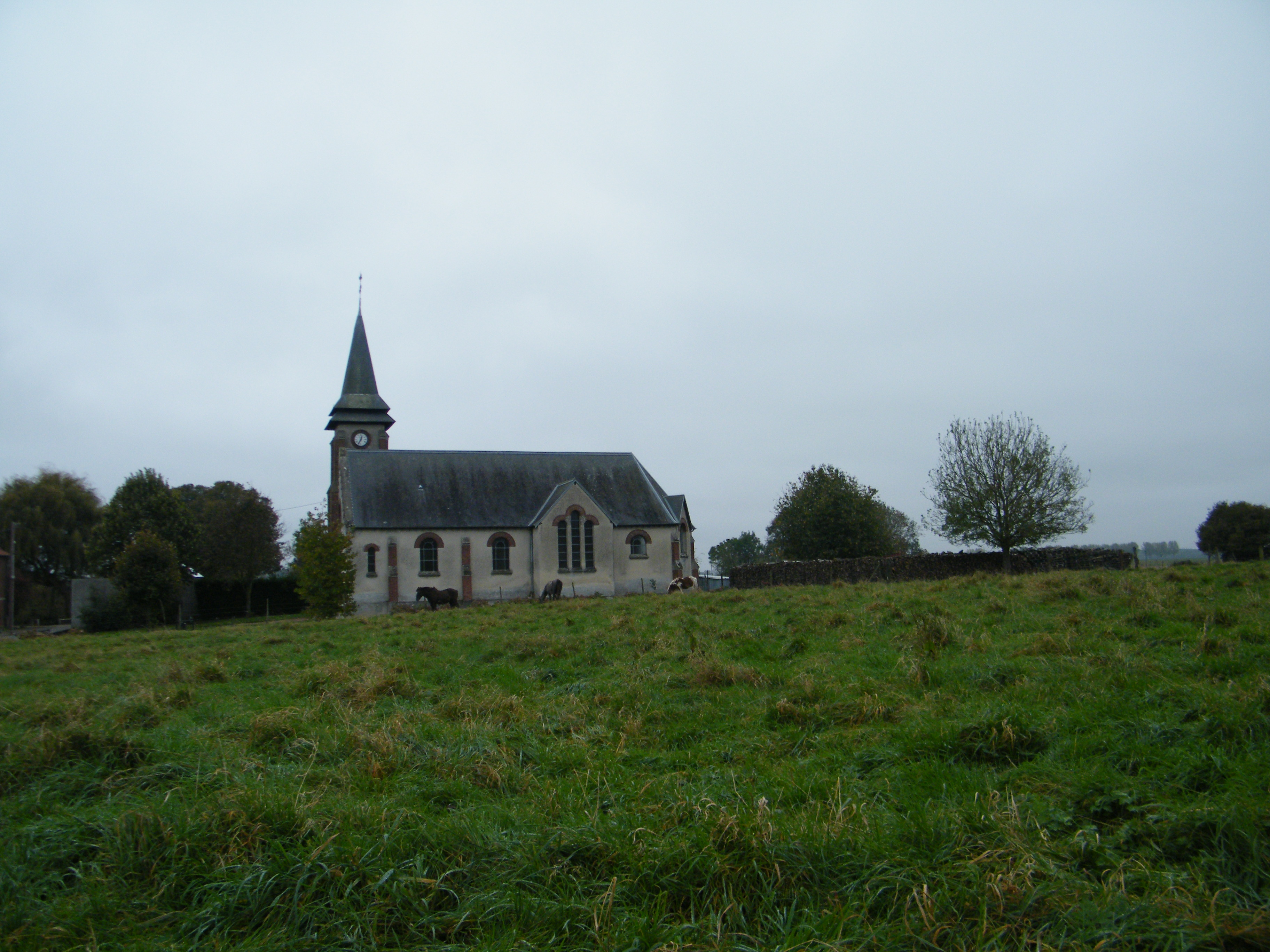 église.